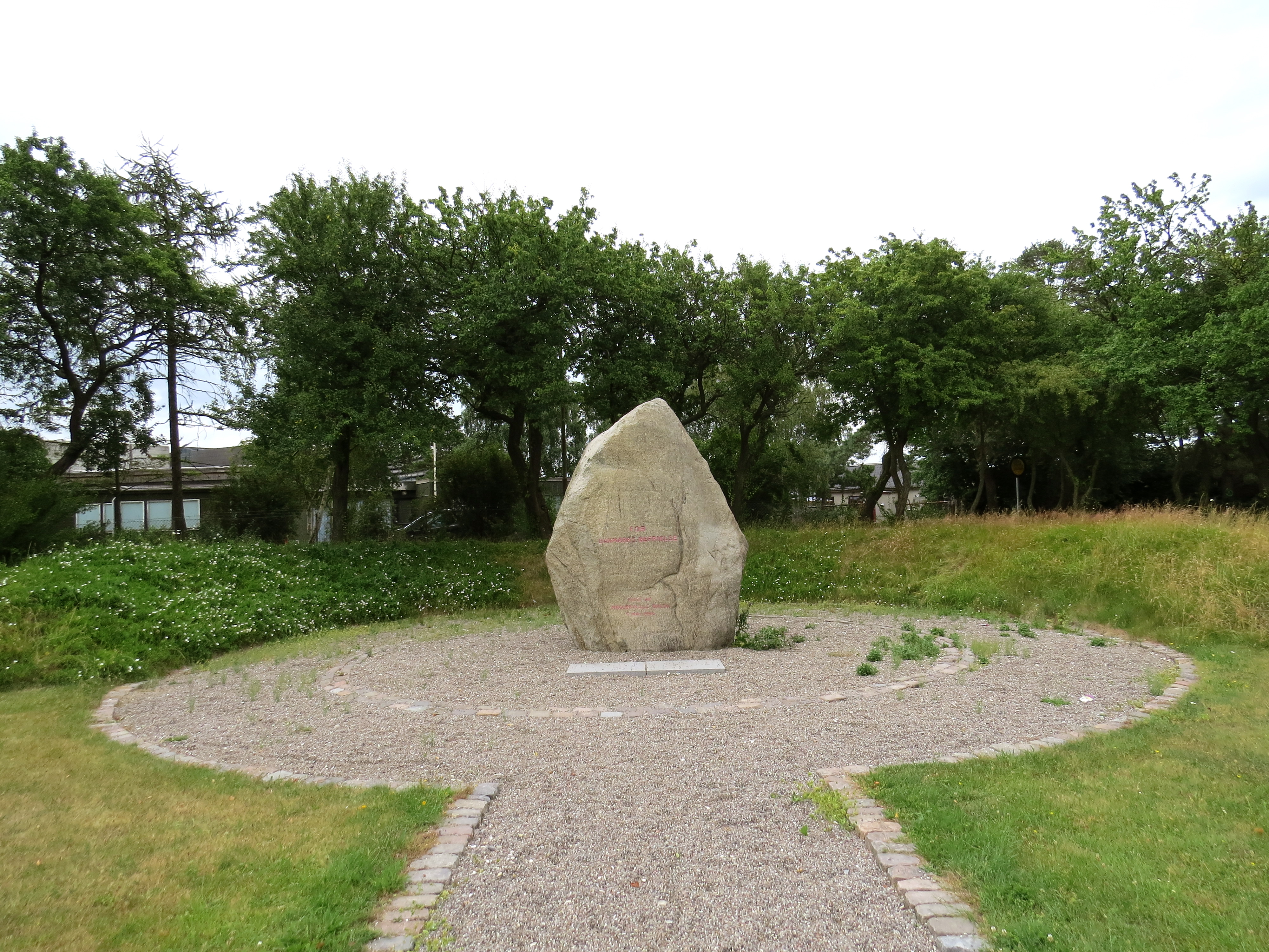 Mindesten over Danmarks befrielse, reist af Maglebylille Bylav 5. Mai 1946, ved Tømmerup Stationsvej, Amager